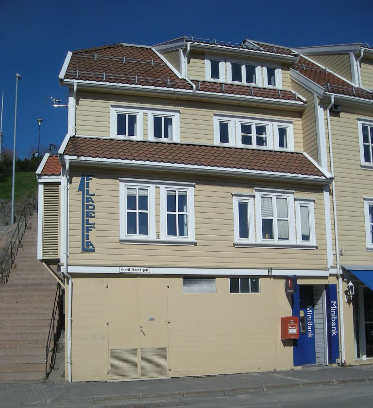 Filadelfia Grimstad